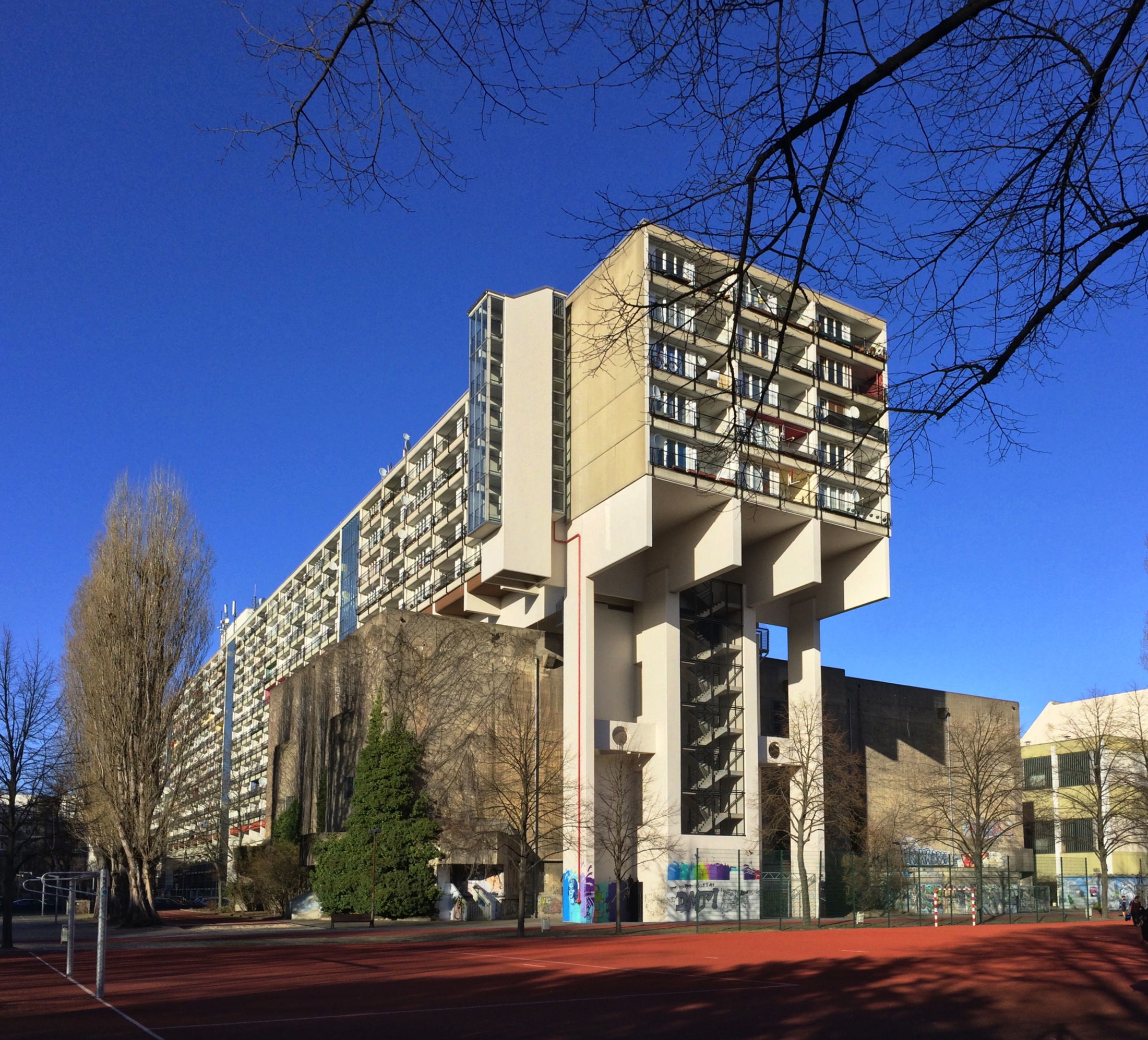 Pallasseum/Wohnen am Kleistpark/Sozialpalast/Sozialpallast, 1973–1977, Jürgen Sawade; Hochbunker Pallasstraße/Sportpalastbunker, 1943–1945